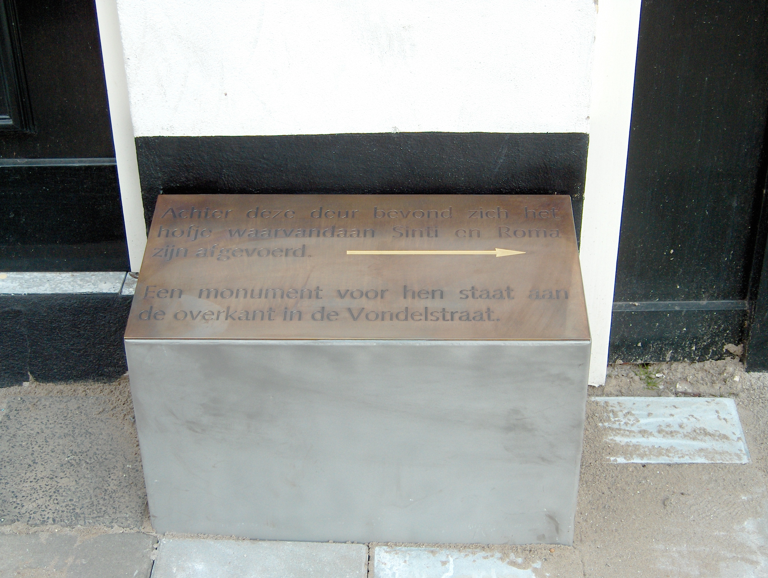 Tegel met verwijzing naar vroegere woning van Sinti familie